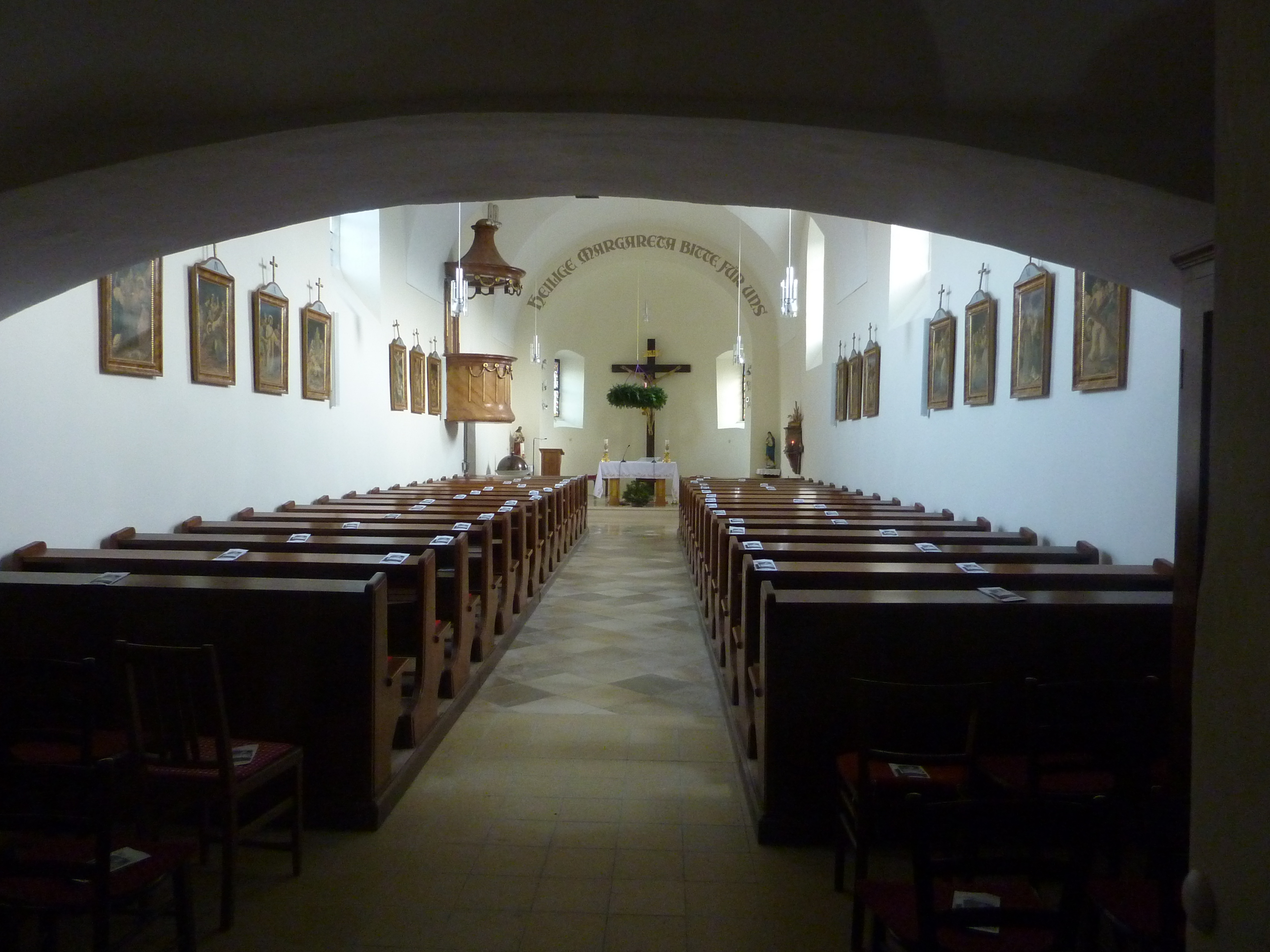 Filialkirche hl. Margarete, Elsarn, Straß im Straßertale, Niederösterreich